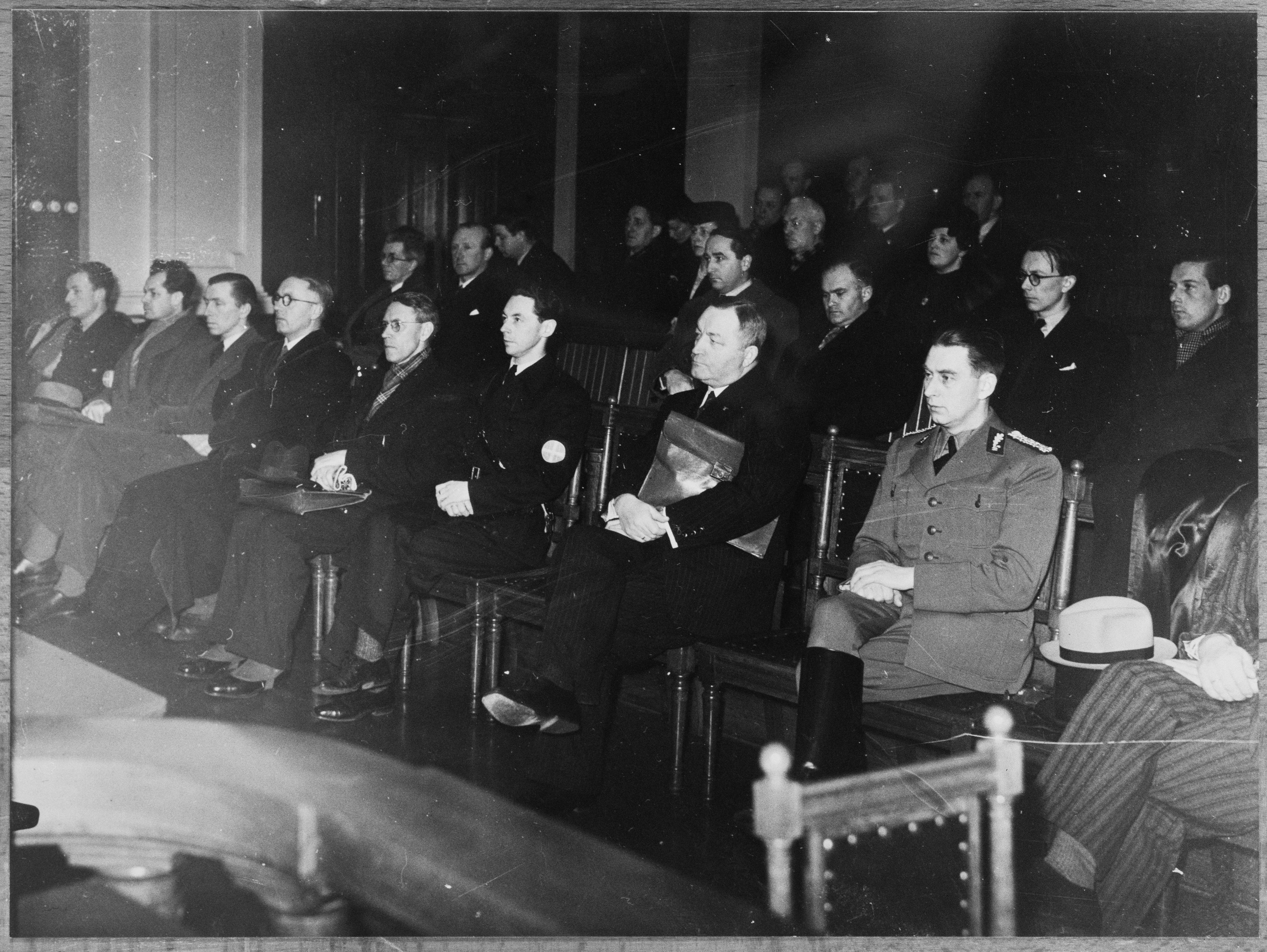 Folkedomstolens første møte (Original bildetekst) Bildet er gjengitt i Aftenposten onsdag aften 12. februar 1941 med bildeteksten «En del av tilhørerne. På første rad sees bl. a. pressedirektør Beggerud, kst. statsråd Lunde og politimester Askvig.»